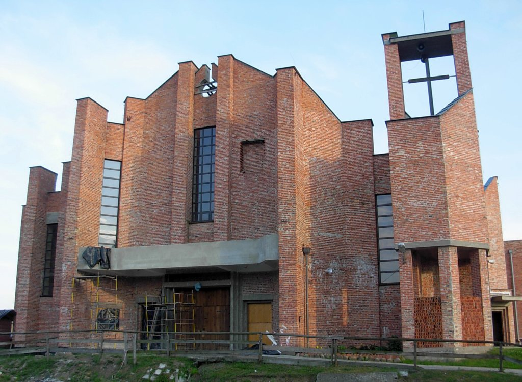 Kościół p.w. Ducha Świętego w Bydgoszczy - Glinkach